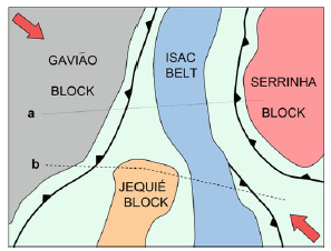 Posição relativa dos blocos arqueanos que deram origem à orogenia paleoproterozoica